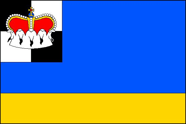 Vlajka obce Písečné (okres Jindřichův Hradec)